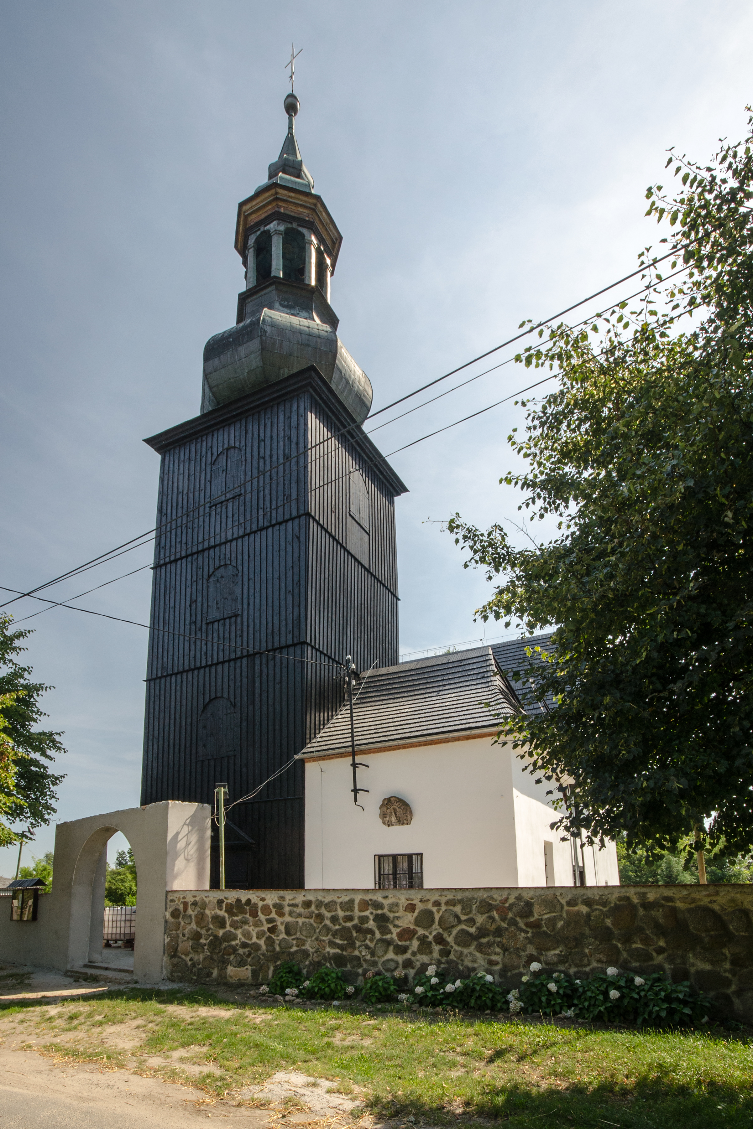 Pełczyn - rzymskokatolicki kościół filialny p.w. św. Teresy, 2 poł. XVII, pocz. XX